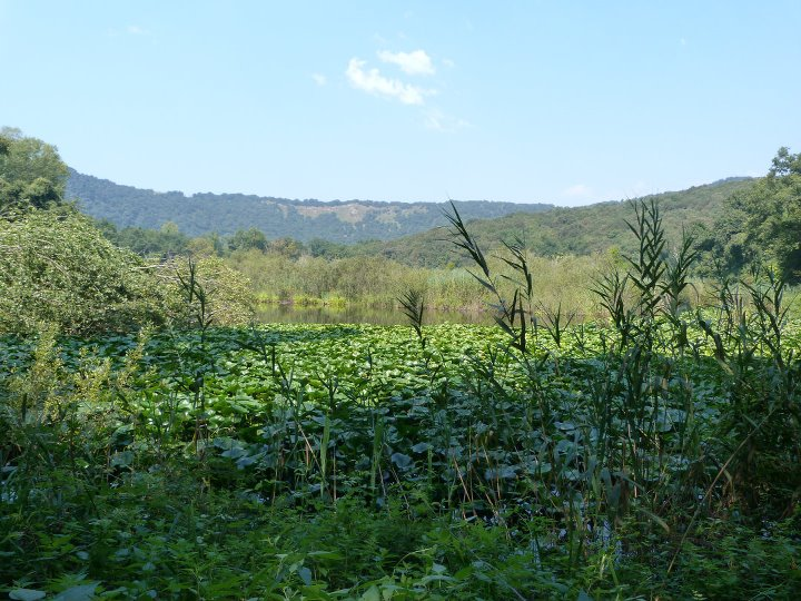 Cratere degli Astroni This is a photo of a monument which is part of cultural heritage of Italy. The authorisation for taking photos of this object was provided by the World Wide Fund for Nature Italy.